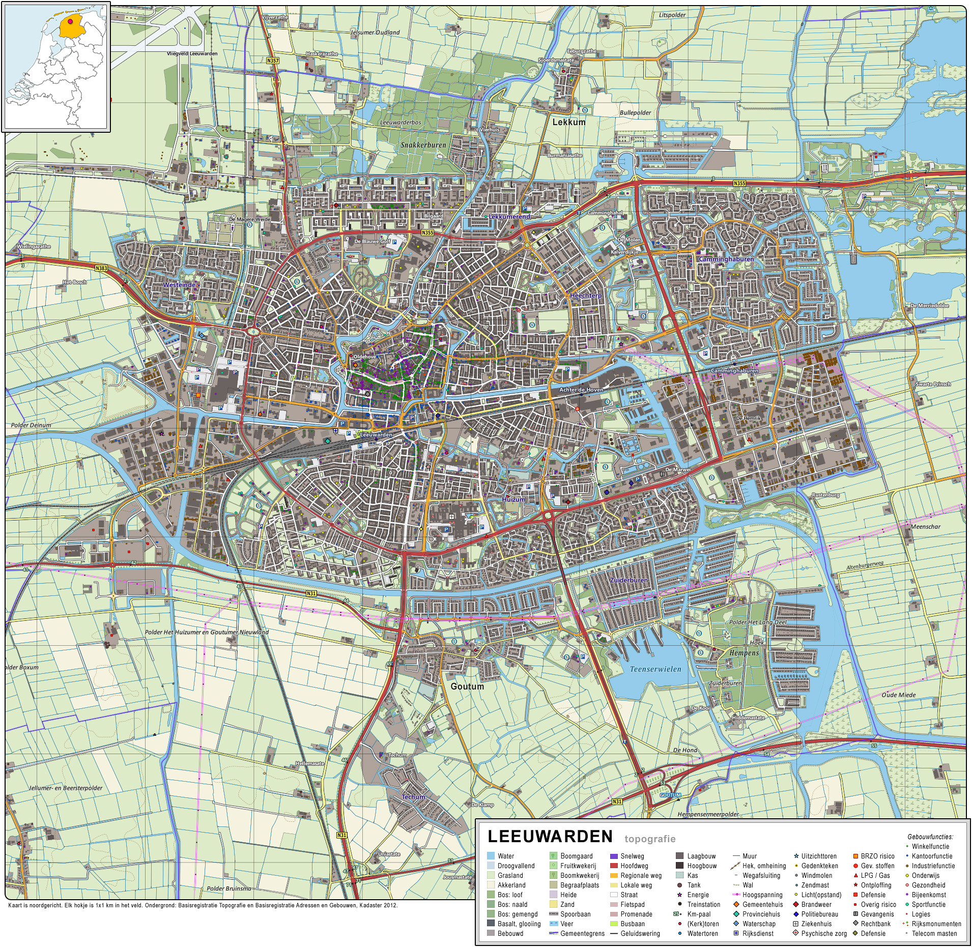 Topografisch beeld van de stad Leeuwarden (Ljouwert). Op basis van de GML open geodata van de BRT/Top10NL (basisregistratie Topografie, Kadaster 2012), vrijgegeven door Kadaster op 30-11-2012 onder de Creative Commons BY licentie. Gebouwvlakken vanuit Open Geodata BAG extract (december 2012). Samenstelling en kleurenschema: Jan-Willem van Aalst.